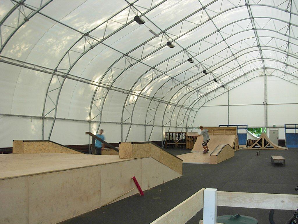 Skatepark w Myślęcinku